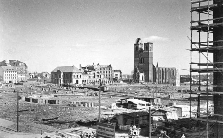 Magdeburg, Rathaus, Johanniskirche, Ruinen Zentralbild Biscan 14.4.1966 20. Jahrestag der SED Magdeburg hat sich verändert Durch anglo-amerikanische Bombenangriffe wurde die Elbestadt stark zerstört. Im Stadtzentrum betrug der Zerstörungsgrad 85 Prozent. 40 637 Wohnungen waren total zerstört, 31 785 nur teilweise. Unter der Führung der Partei der Arbeiterklasse wurde im Verlauf von 20 Jahren nahezu alle Kriegsschäden beseitigt und ganze Stadtviertel neu aufgebaut. Hier die Kreuzung Wilhelm Pieck-Allee - Karl Marx-Straße in den Kahren 1952. Vergleichsfoto siehe E 0414-09-2+3N